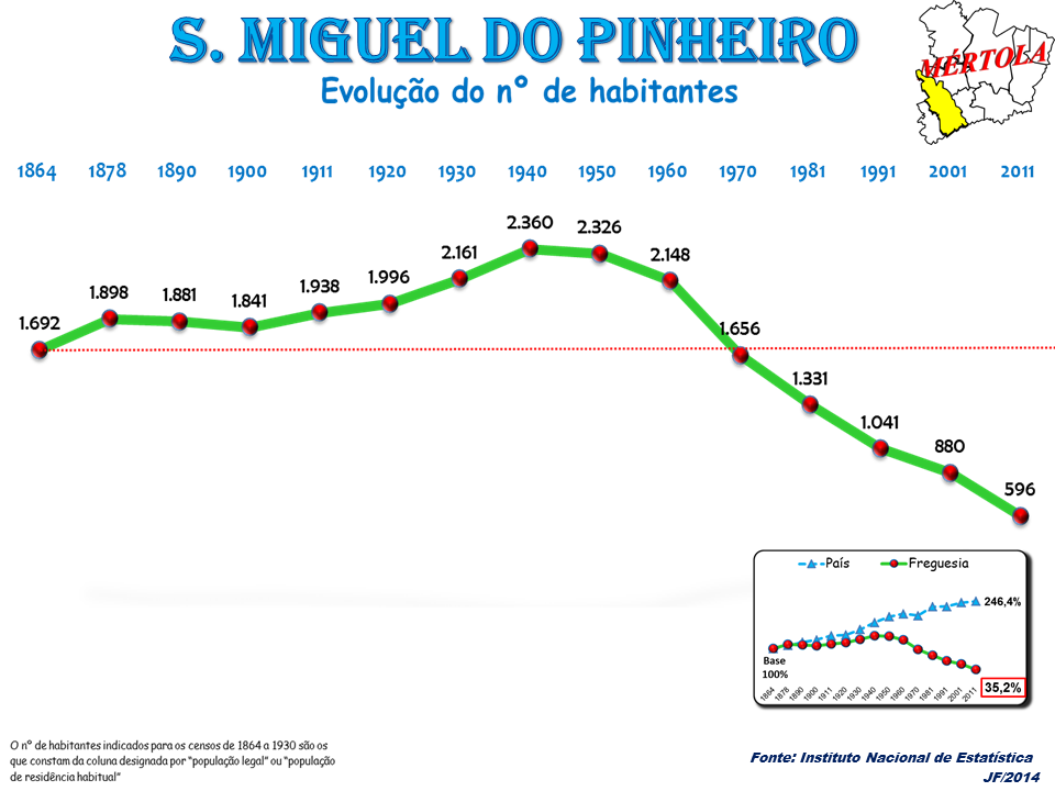 Evolução da População 1864 / 2011